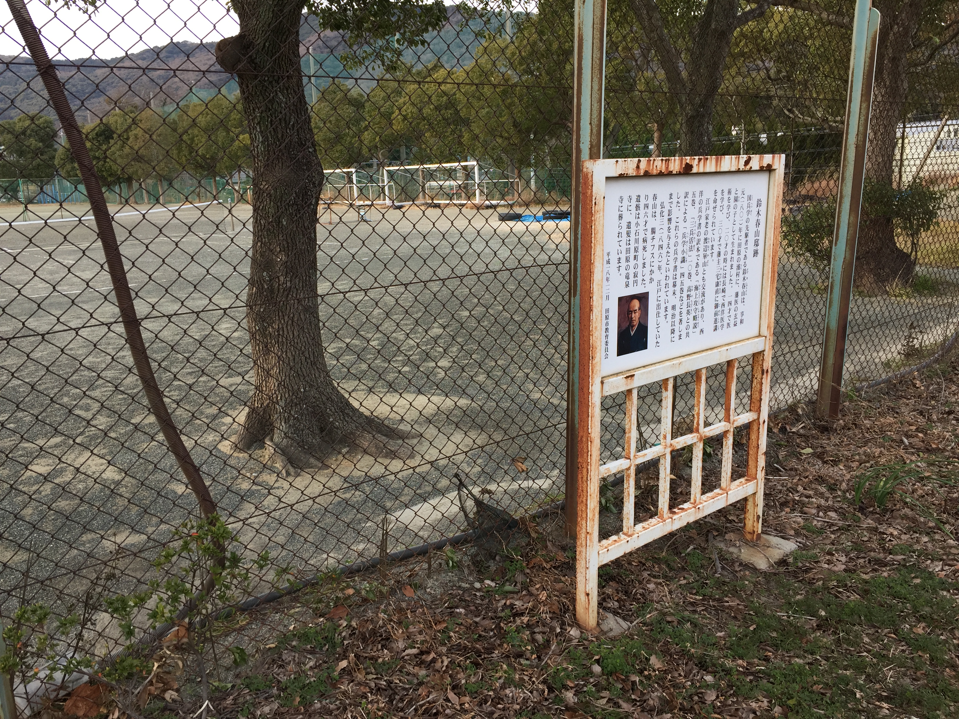 三河国田原出身の藩医兼兵学者、鈴木春山（1801-46）の自宅兼診療所跡。田原城北、角場（射撃訓練場）の一角にあった。天保元年、失火により全焼したため、城惣門脇に移転した（『田原町史』中巻）。